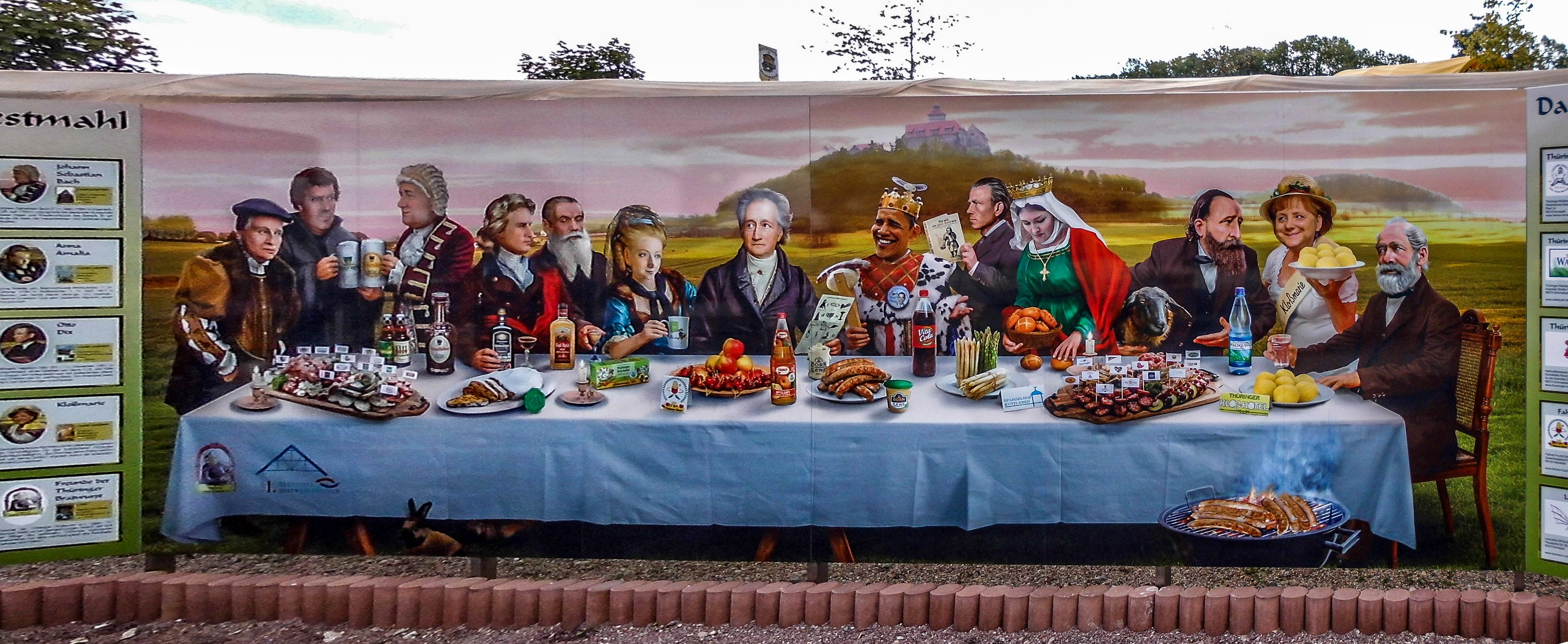 „Das Thüringer Festmahl“ von Arno Funke - Standort 1.Bratwurstmuseum Holzhausen Personen auf dem Bild „Das Thüringer Festmahl“ von Arno Funke: Thomas Münzer Martin Luther Johann Sebastian Bach Friedrich Schiller Lucas Chranach der Ältere Anna Amalia von Sachsen-Weimar Johann Wolfgang von Goethe Bratwurstkönig Obama Otto Dix Elisabeth von Thüringen Alfred Brehm Kloßmarie Angela Carl Zeiss